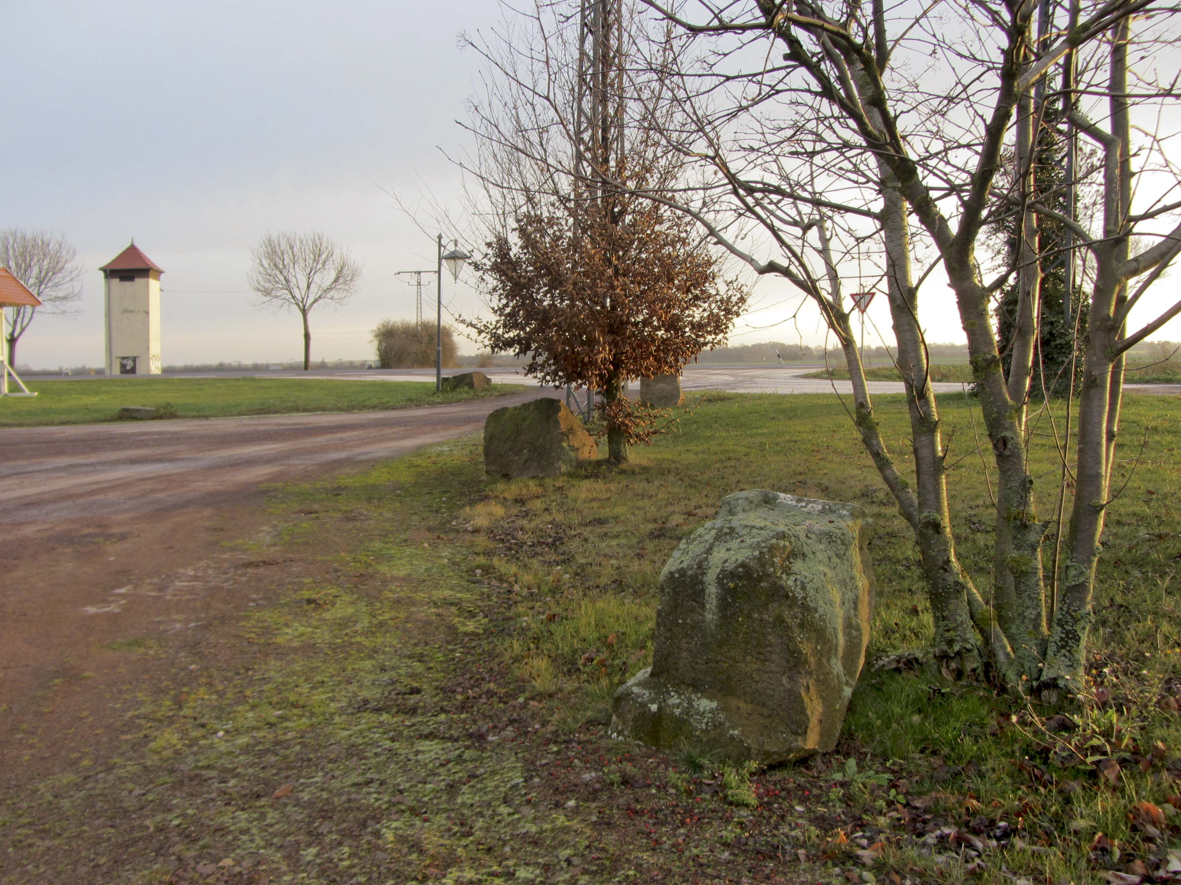 Rest eines Preußischer Halbmeilenstein an der L 50 Parkplatz Landgasthof "Sattelhof"